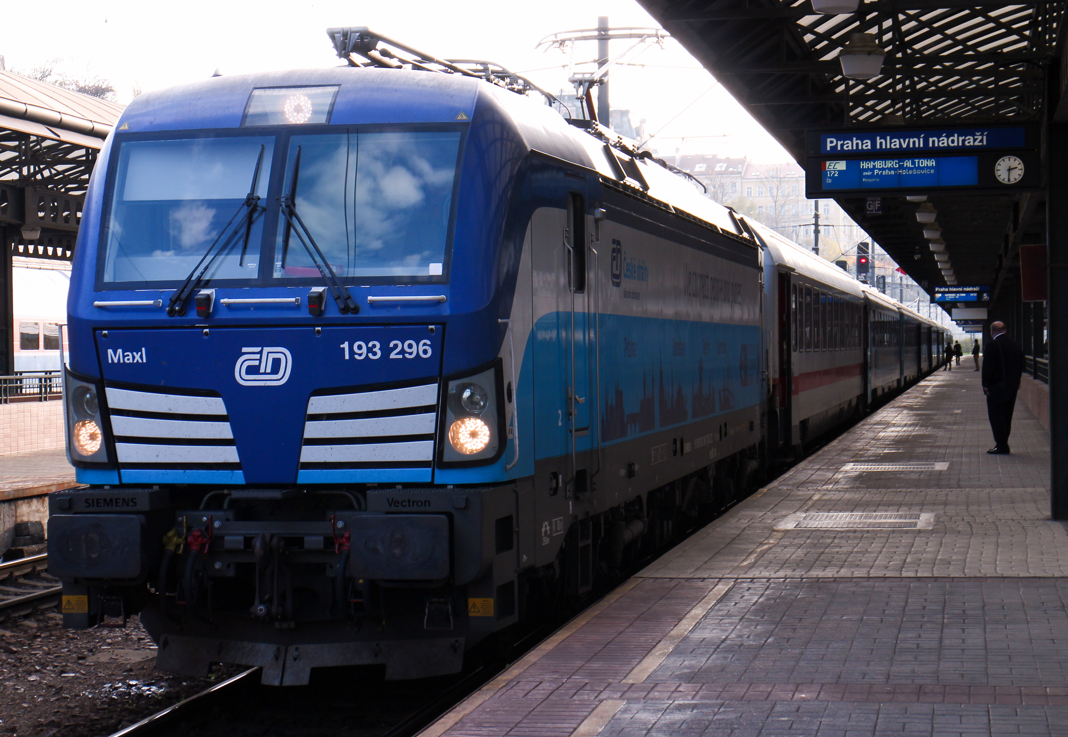 Lokomotiva zachycena před odjezdem s EC 172 Hungaria